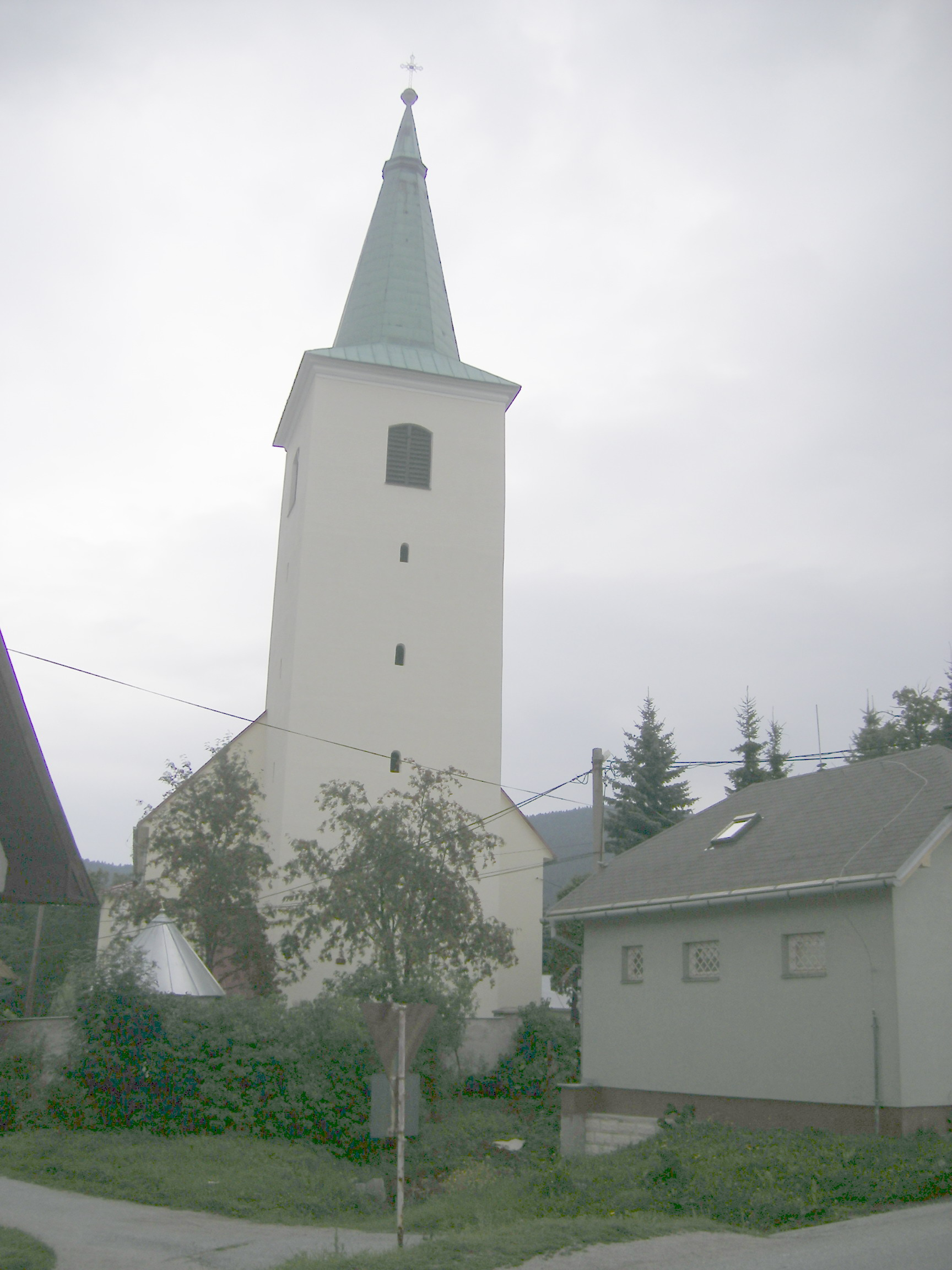 Horná Štubňa (okres Turčianske Teplice)